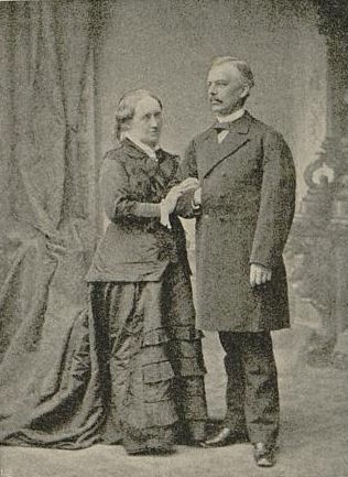 Adele Vermehren geb. Hase (left) and her husband Moritz Vermehren (right)